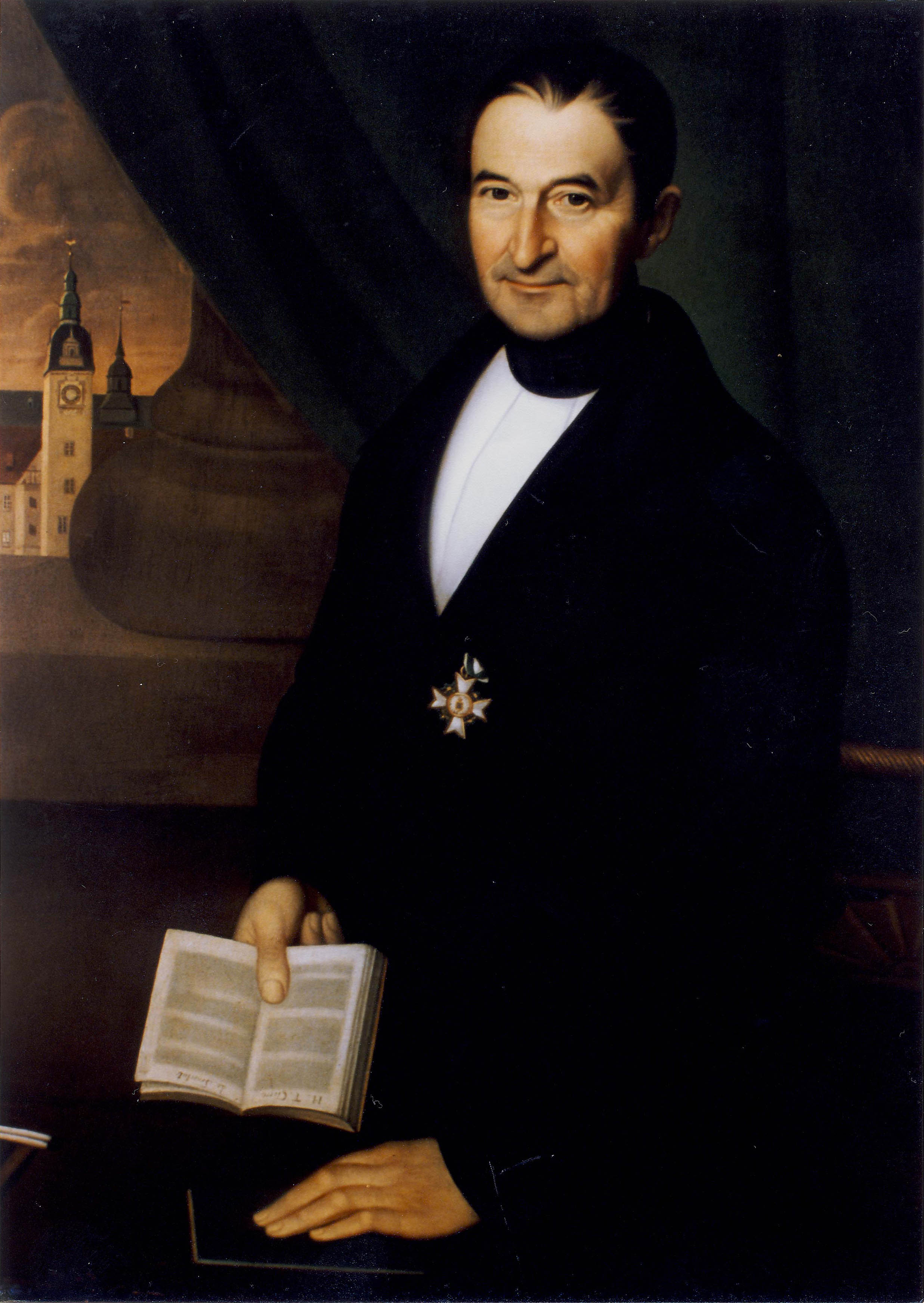 Christian Friedrich Wehner (1775-1862), Chemnitzer Bürgermeister von 1832 bis 1846